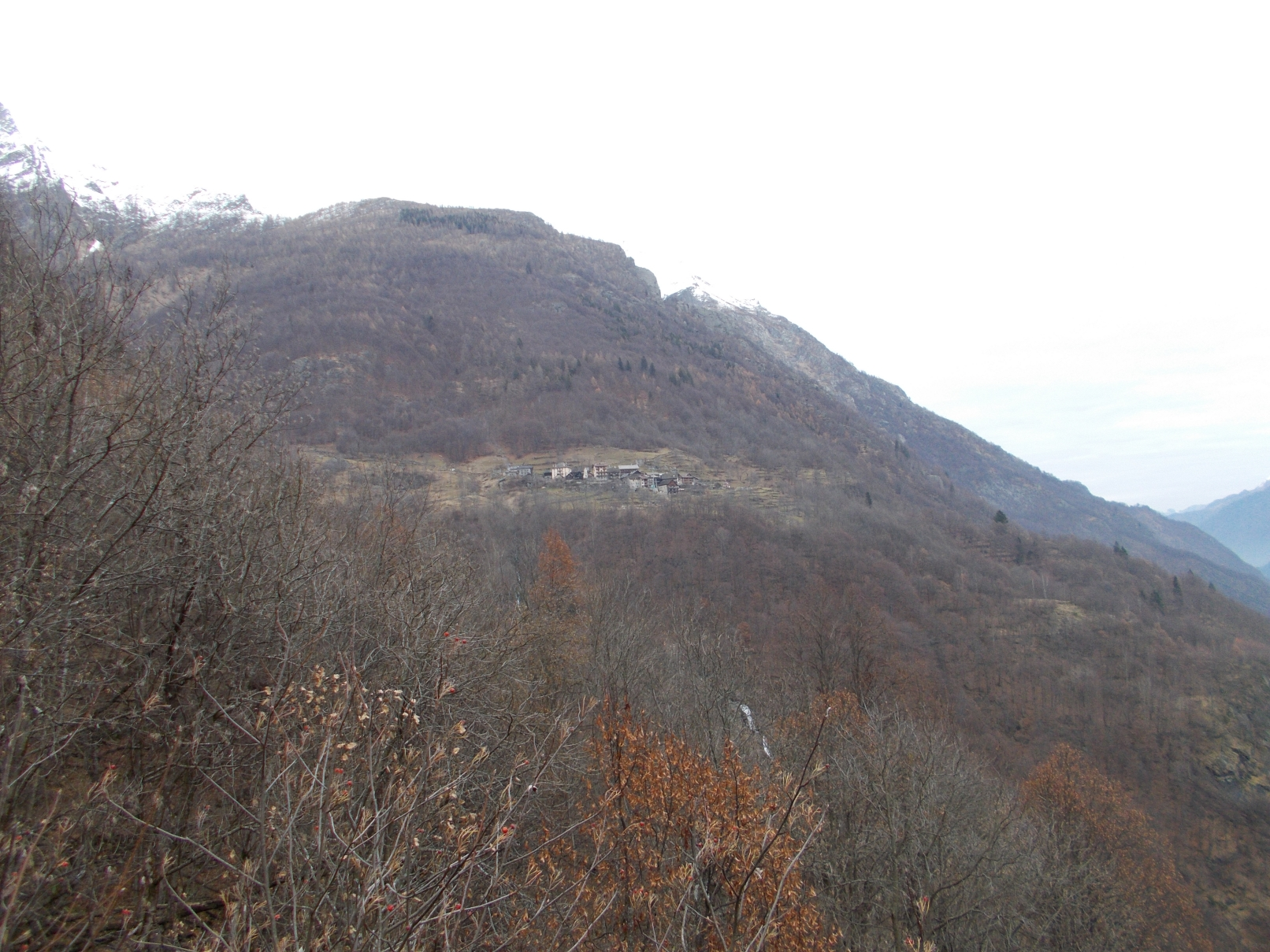 Vista dal punto panoramico di Stabioli su Mondelli, frazione del comune di Ceppo Morelli (VB) - Piemonte - Italia